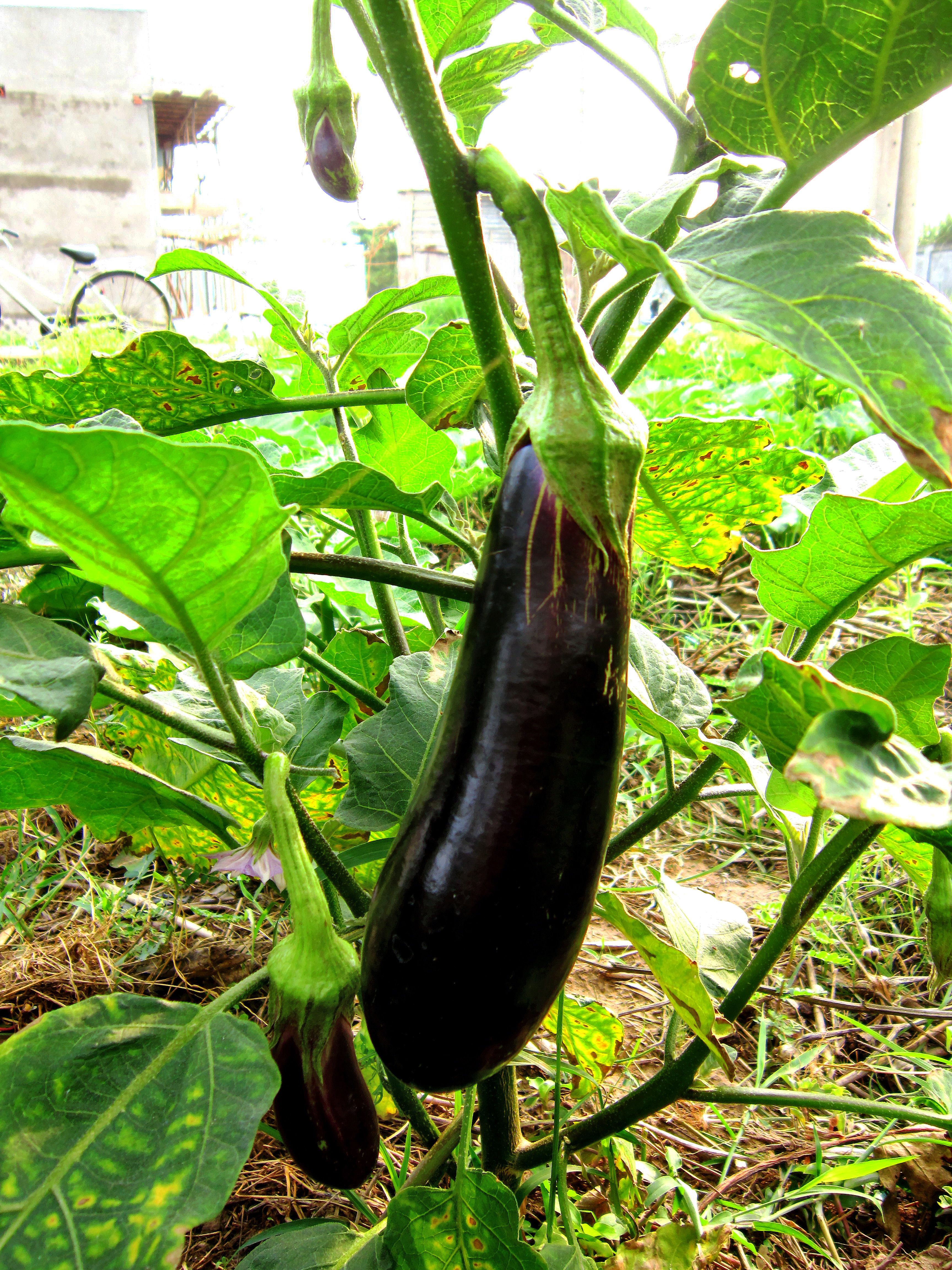 Lá và quả cà tím ở miền Nam Việt Nam.